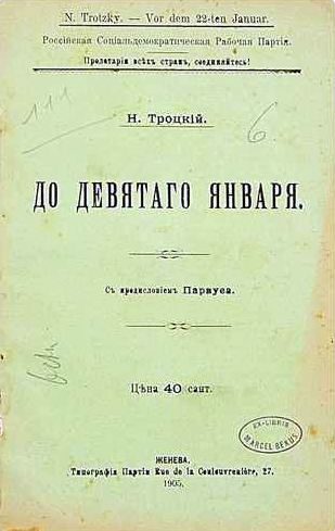 [Троцкий, Л.Д.] До девятого января / Н. Троцкий; с предисл. Парвуса; РСДРП. Женева: тип. Партии, 1905. - XIV, [2], 64 с.; 18,3х11,7 см. В шрифтовой издательской обложке. Надрывы и утраты маленкьих фрагментов корешка, фоксинги по обложке, шт. - экслибрис «Ex-libris Marcel Becus» на 1 с. обложки и обороте тит. л. Марсель Бекю (Marcel Bekus, 1888-1939), родился в Варшаве, на территории Российской империи, участвовал в революции 1905 г., был сослан в Сибирь, в 1919 г. переехал во Францию. Книги начал собирать в юности. Его коллекция состояла из книг по всеобщей истории, истории Французской революции, а также множества изданий, посвящённых российским революциям и российскому политическому устройству.